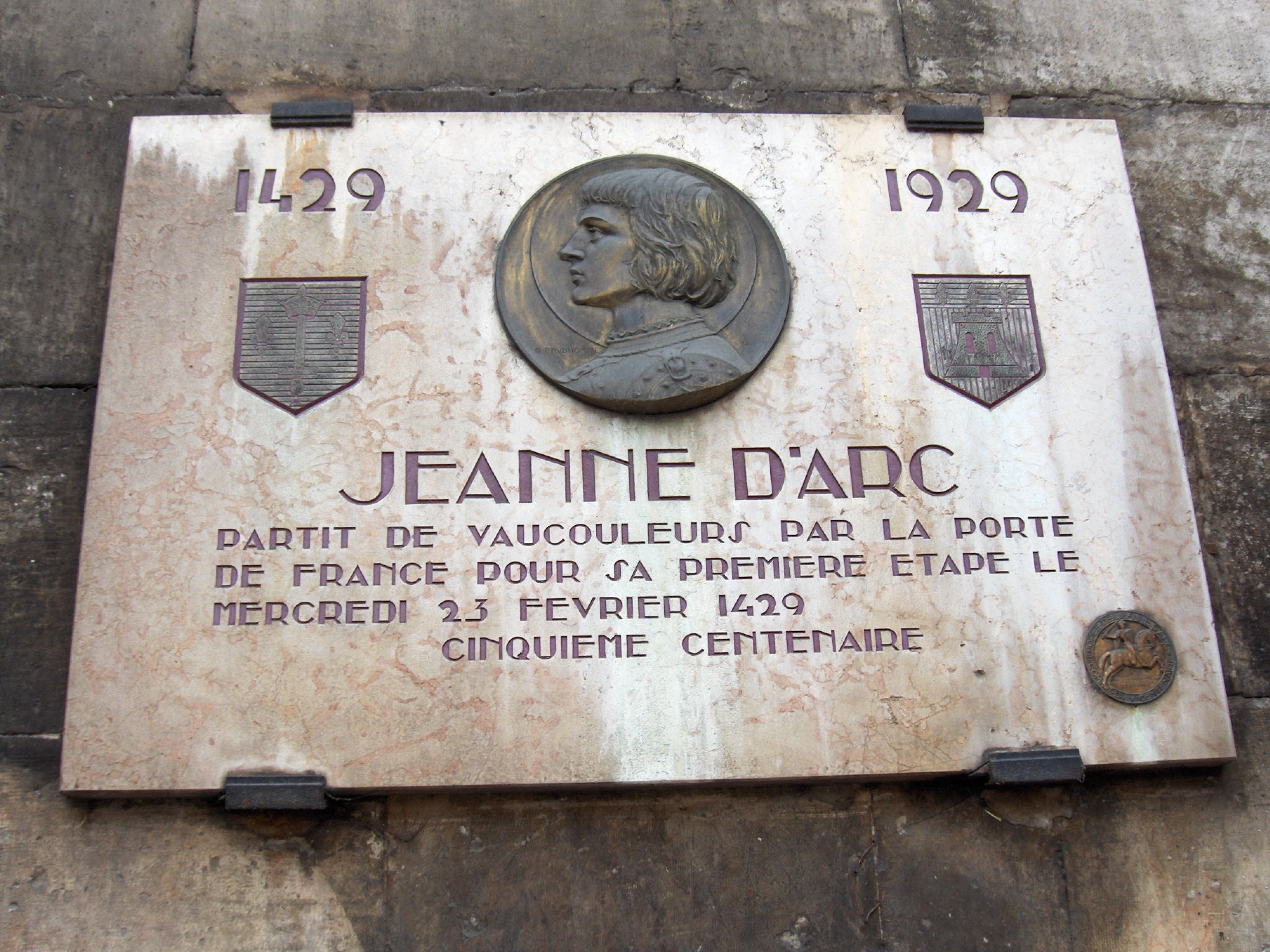 Plaque commémorative Jeanne d'Arc (500ème anniversaire) à Vaucouleurs (Meuse, France)